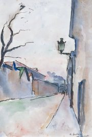 Painting by Maurice Asselin